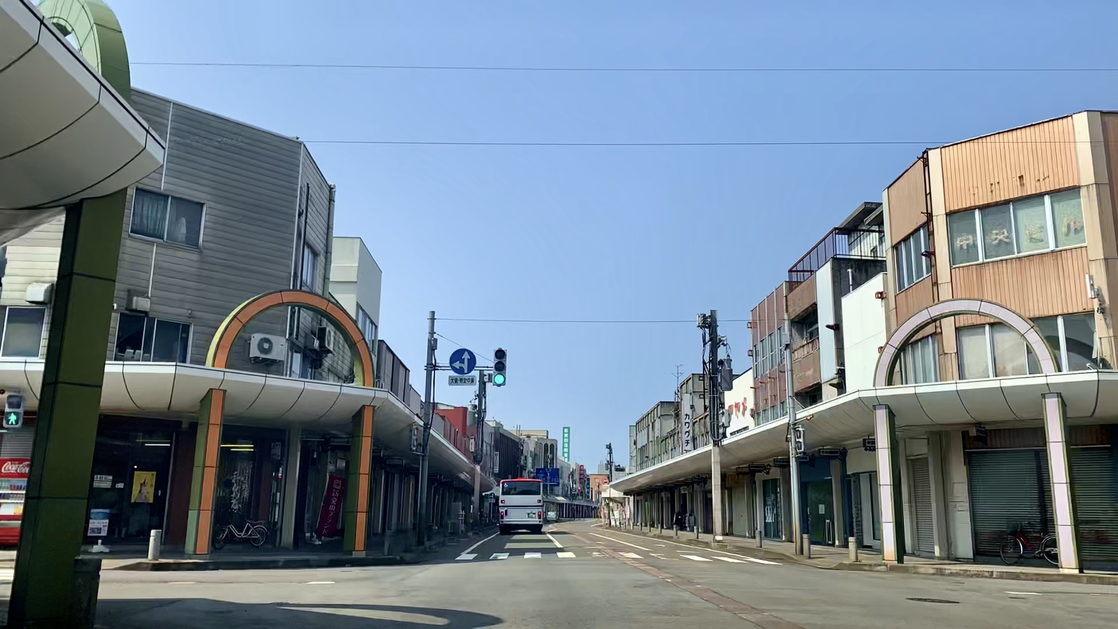 新発田市街（中央商店街，2020年3月）国道290号・新潟県道32号新発田停車場線